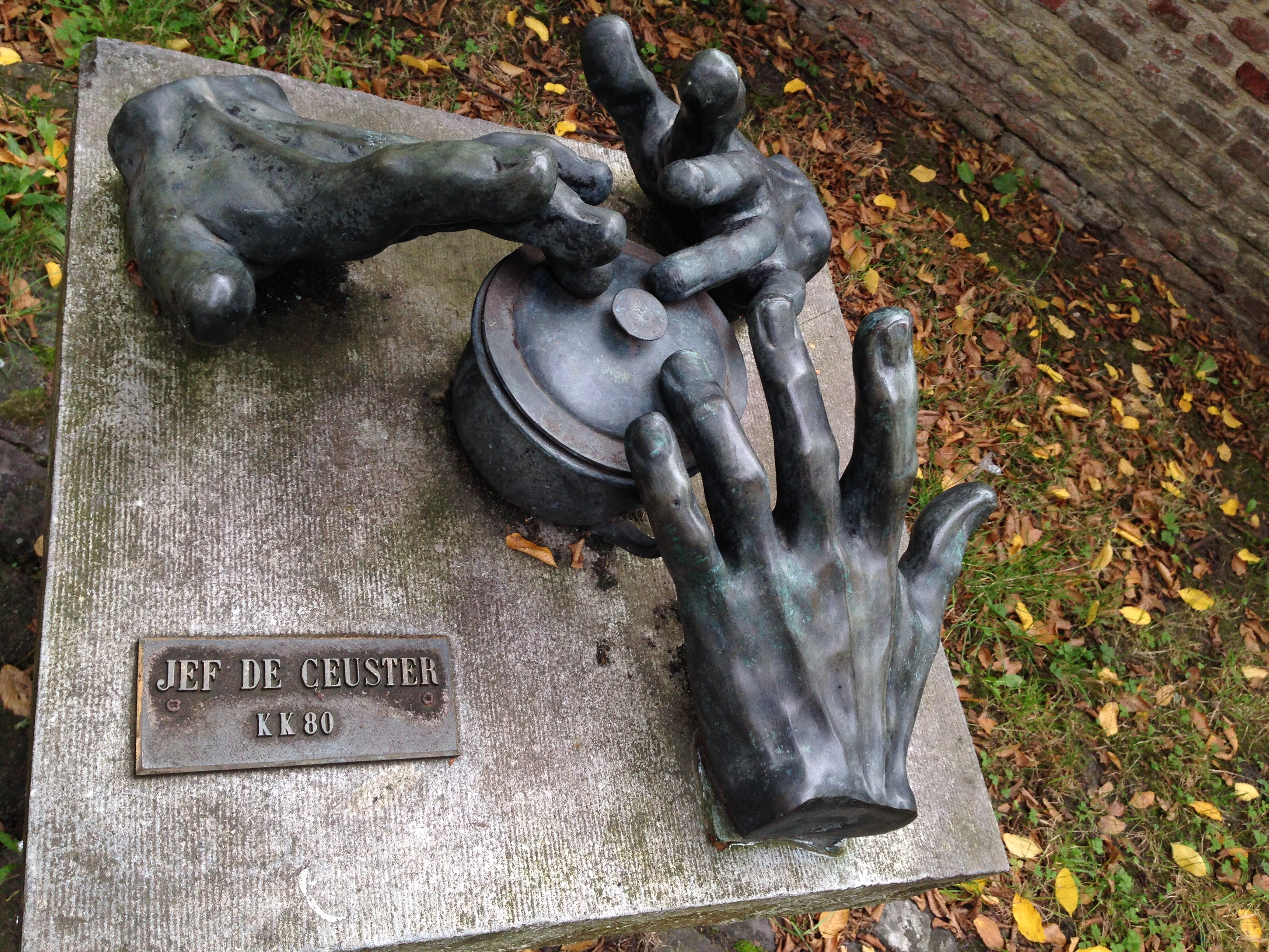 Handen die een pot dicht houden. (Doofpot) Soms moet informatie in het belang van elk mensheid dicht gehouden worden. Herentals, België.